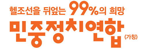 한국어 (조선): 대한민국의 정당 '민중정치연합' 의 로고